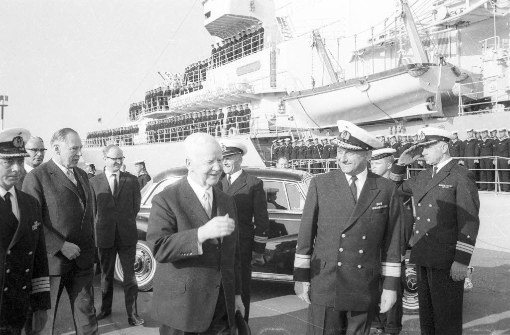 Bundespräsident Heinrich Lübke mit Chef des Marineamtes Admiral Günter Kuhnke. 3. v.l. Ministerpräsident Helmut Lemke.